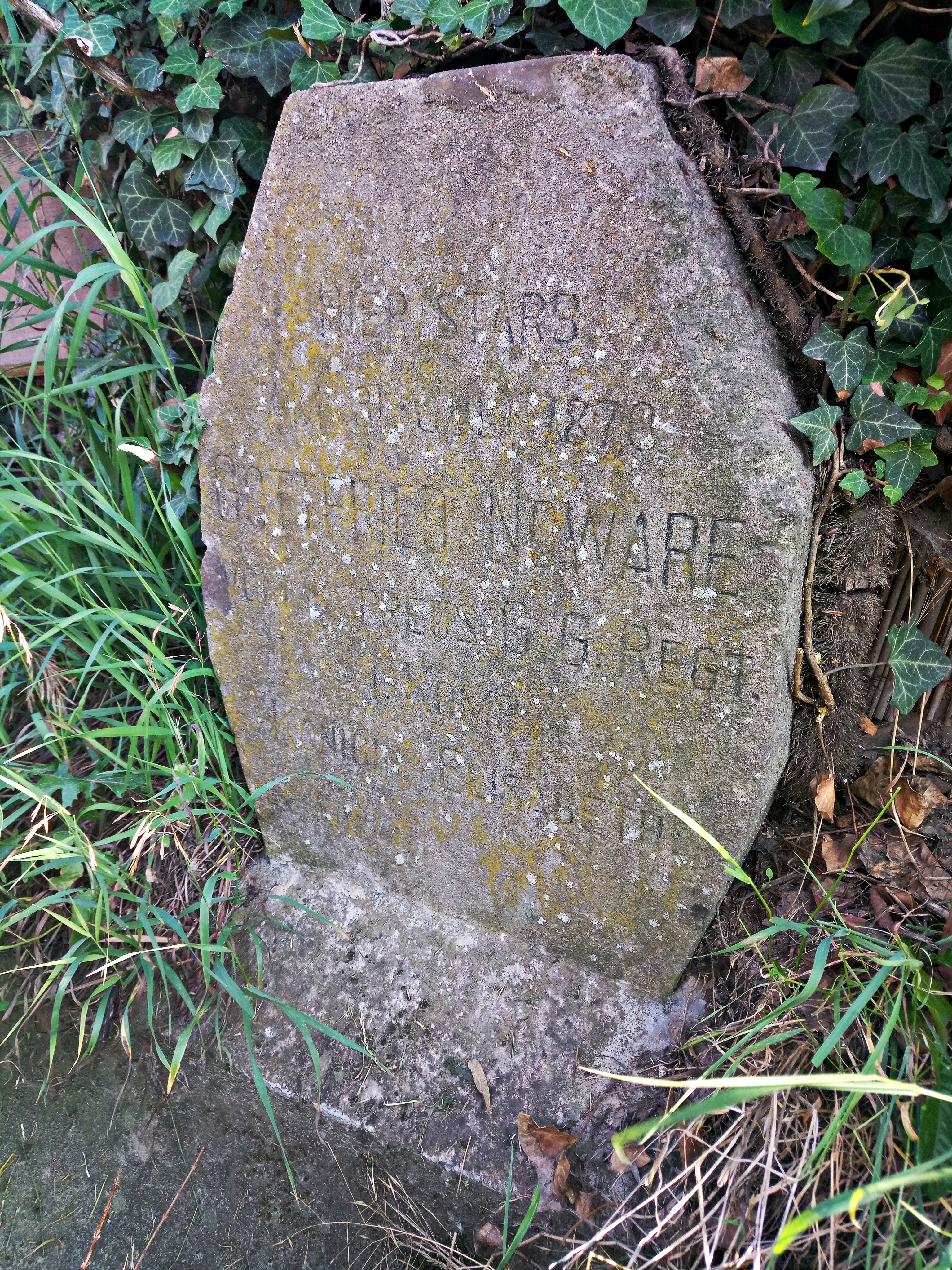 Dirmstein, Gedenkstein Gottfried Noware, 1870